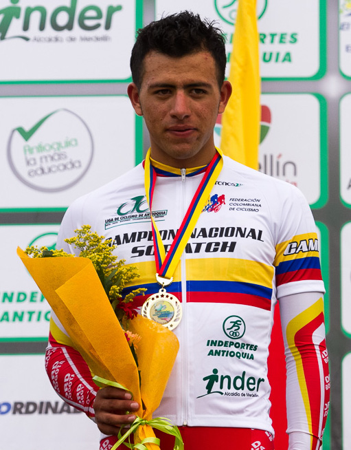 Podio Prueba Scratch Varones Oro: Jordan Parra (Bogotá) Campeonato Nacional de Pista 2013 Velódromo Martín Emilio Cochise (Medellín) Domingo 20 de octubre de 2013